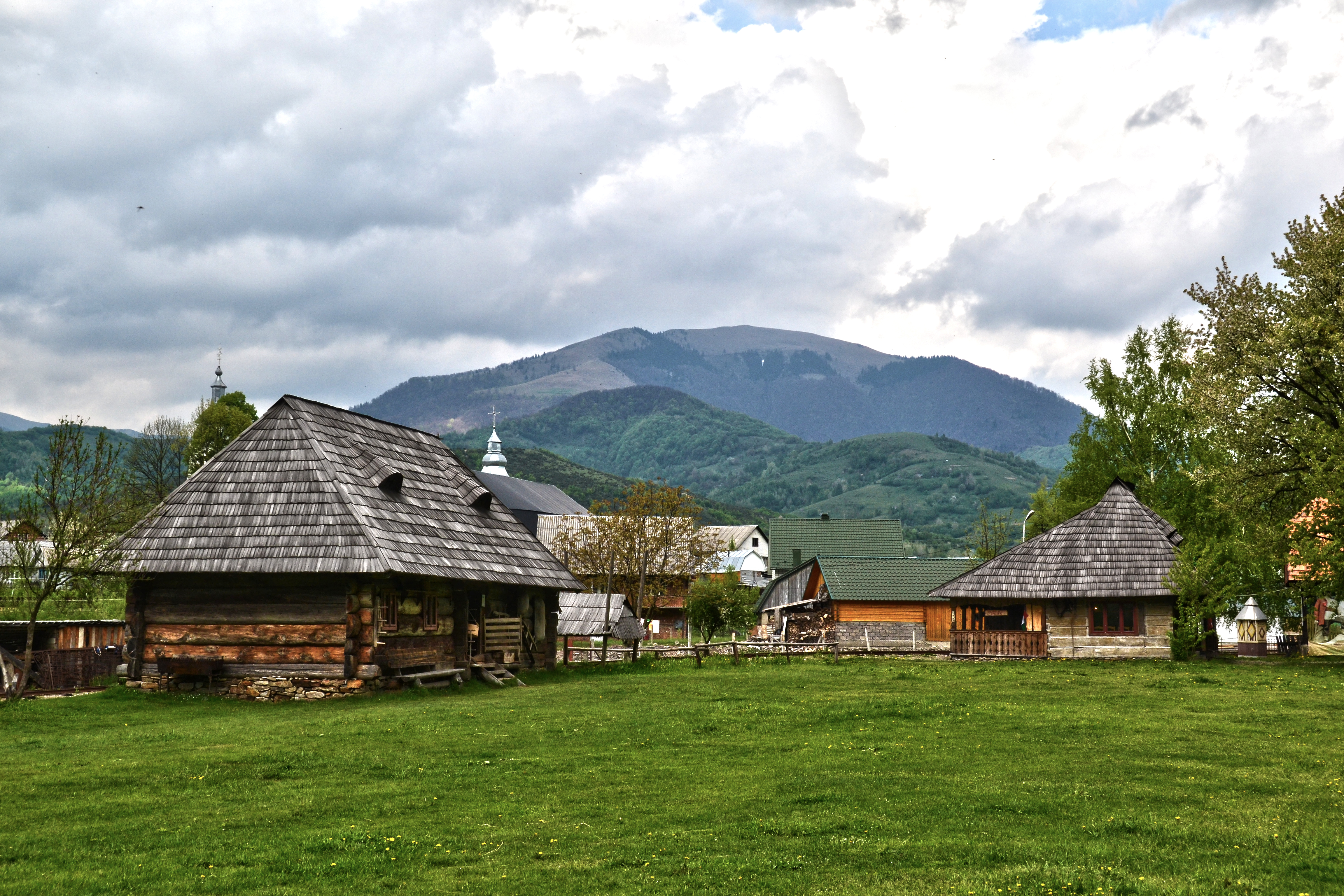 Колочава, Міжгірський район